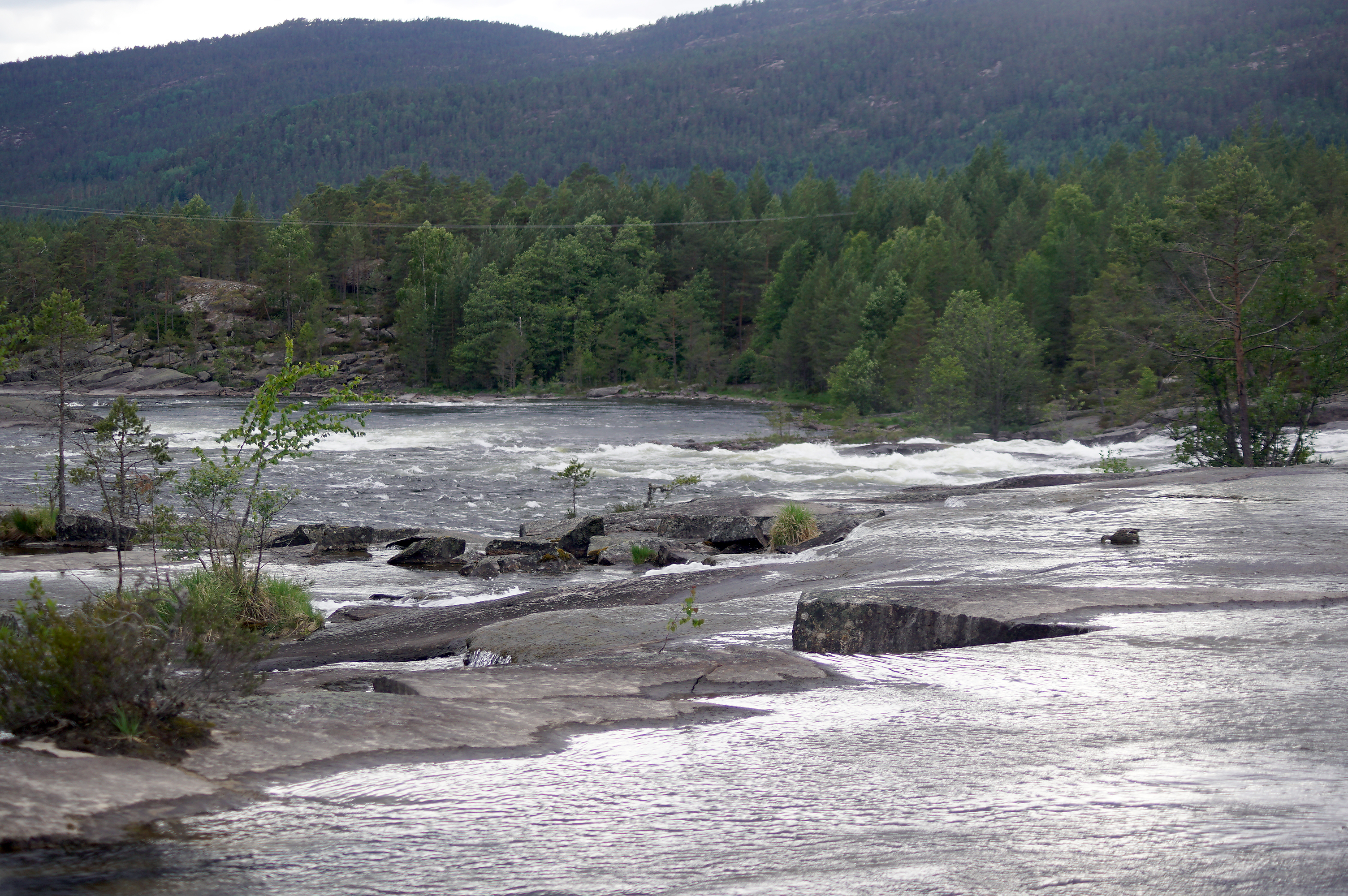 set mod sydvest